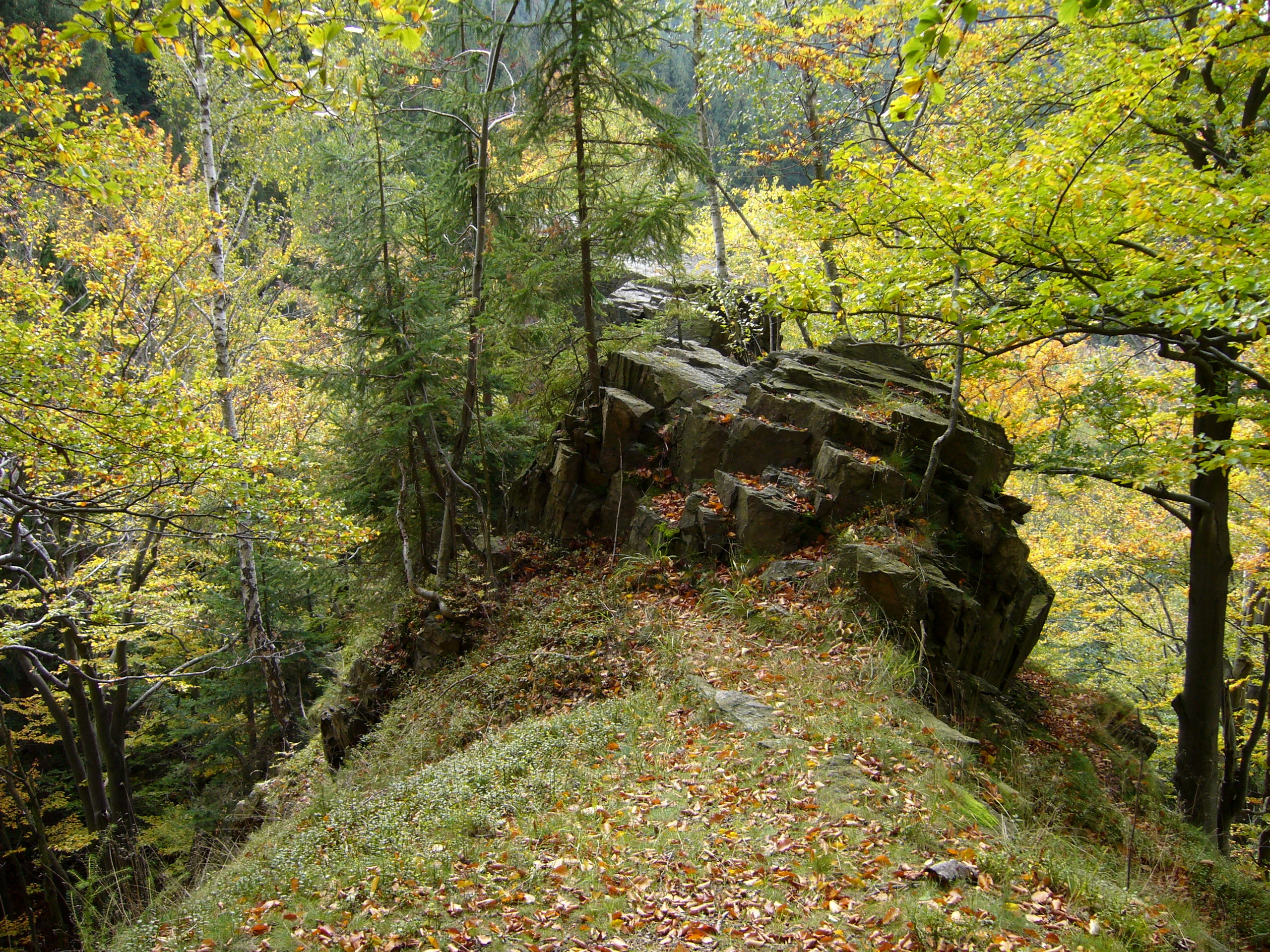 Hrad u Brandova - vrchol Loupežnické skály v areálu hradu